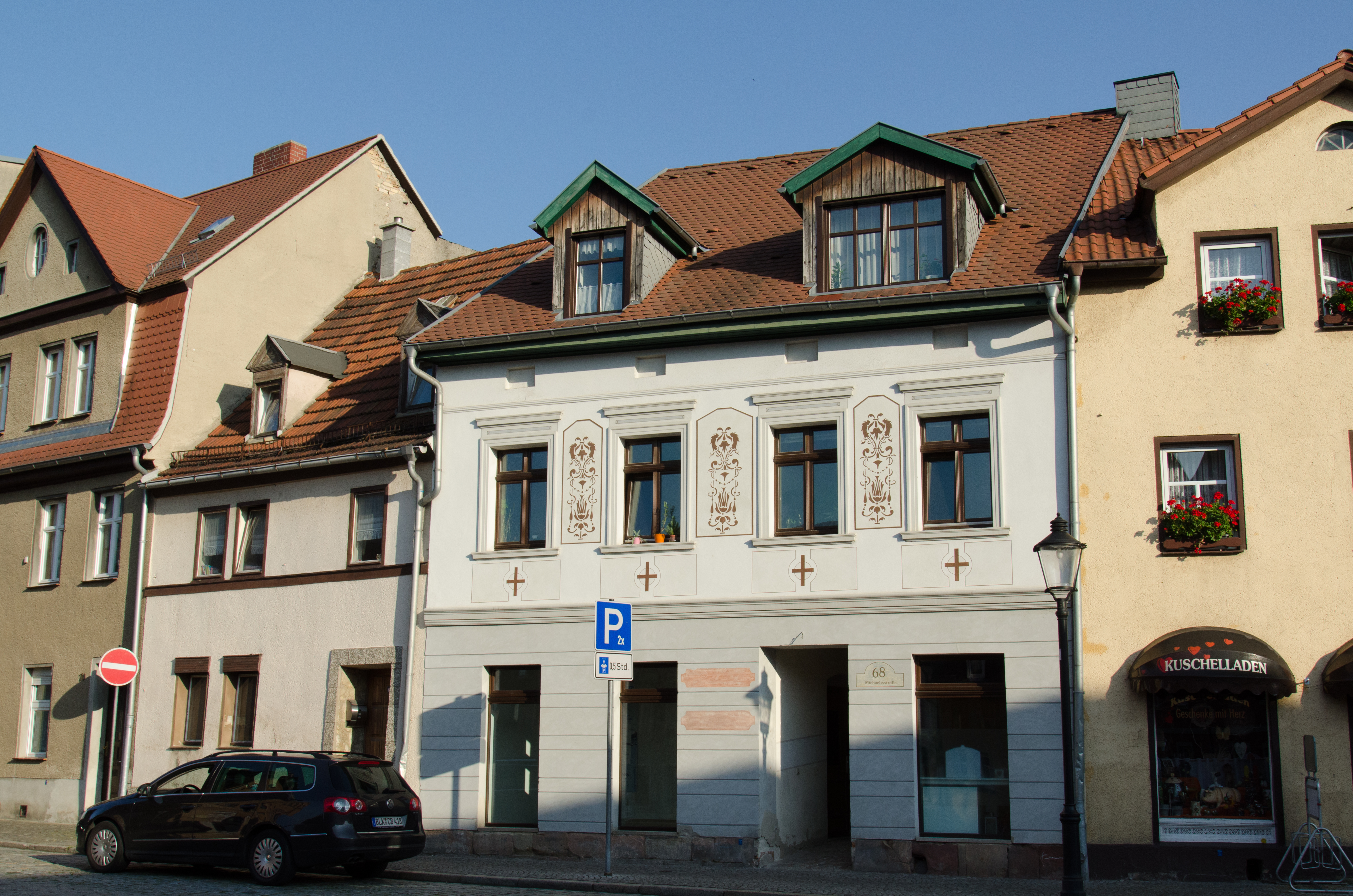 Naumburg, Michaelisstraße 68